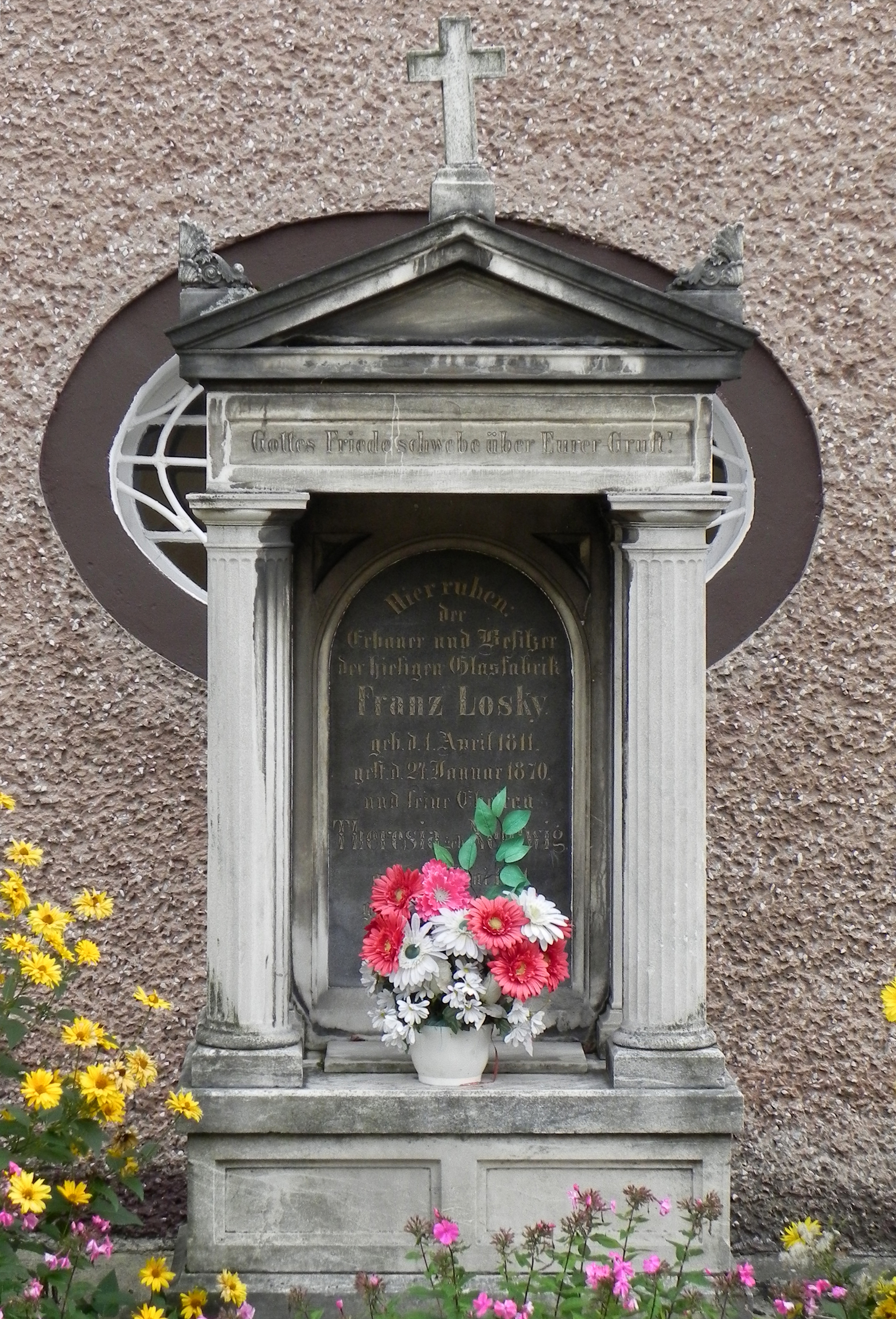 Stronie Śląskie, kościół p.w. św. Marcina, XVIII